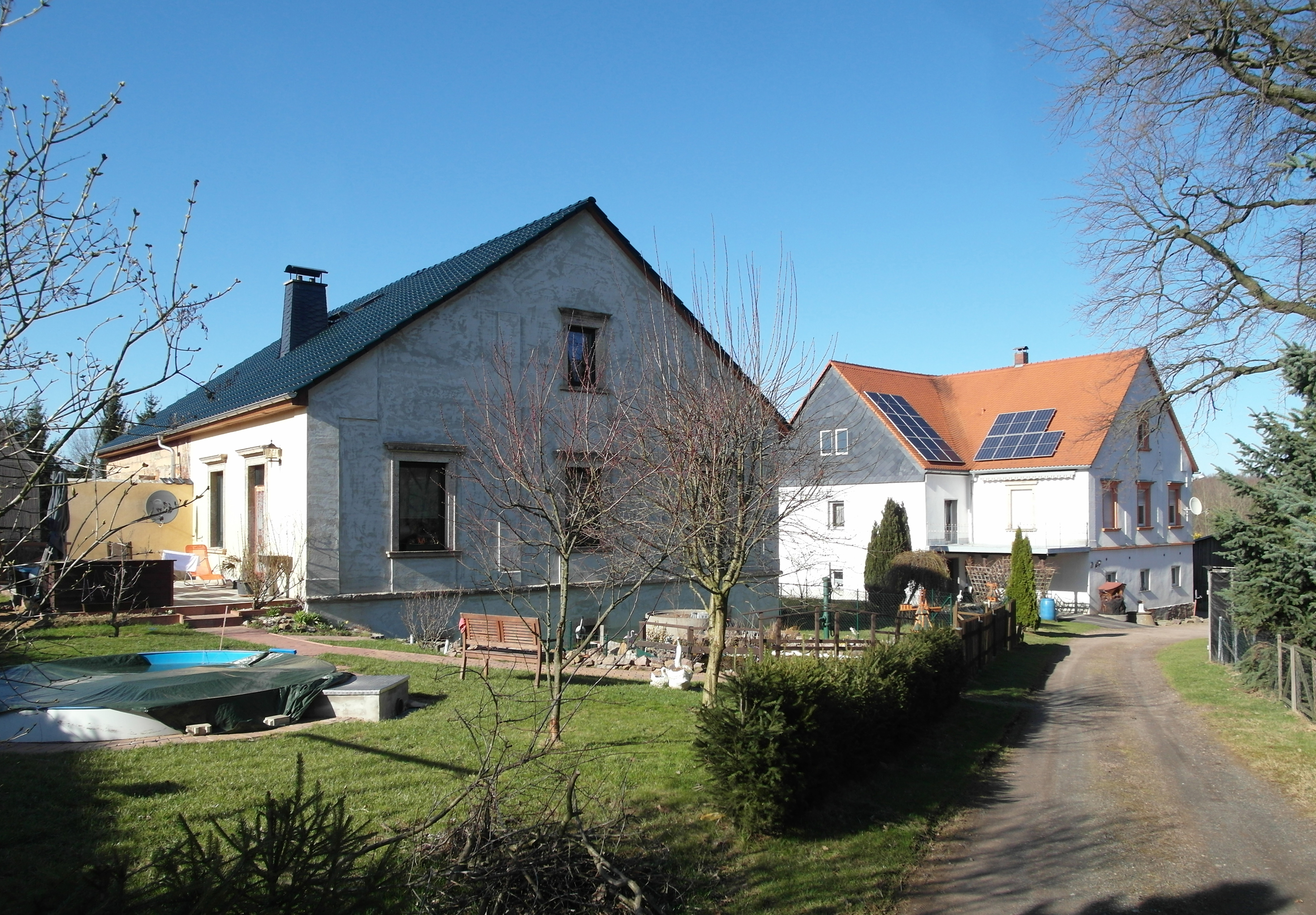 06.04.2018 09661 Arnsdorf (Striegistal), Rittergut Berbersdorfer Straße. Die beiden "Einfamilienhäuser" Berbersdorfer Straße 24 (links, GMP: 51.010035,13.143778) und Berbersdorfer Straße 22 (rechts, GMP: 51.010152,13.144210) sind Teile des bis 1945 bestehenden Schlosses. Ohne historische Fotos vermag sich niemand mehr das einstige Schloß vorzustellen. Der Herrensitz hatte sich wahrscheinlich im späten 12. Jahrhundert herausgebildet. Mitte des 18. Jahrhunderts entstand wohl das Schloß, dessen Fassaden 1891 unter Max Freiherr von Beschwitz im Neorenaissancestil aufgehübscht wurden und so bis zur zur Bodenreform bestanden. Ein Foto von 2005 zeigt noch den hochaufragenden Neorenaissancegiebel am Haus Nr. 24, der ab 2007 dann abgetragen worden ist. [SAM5065.JPG]20180406600DR.JPG(c)Blobelt